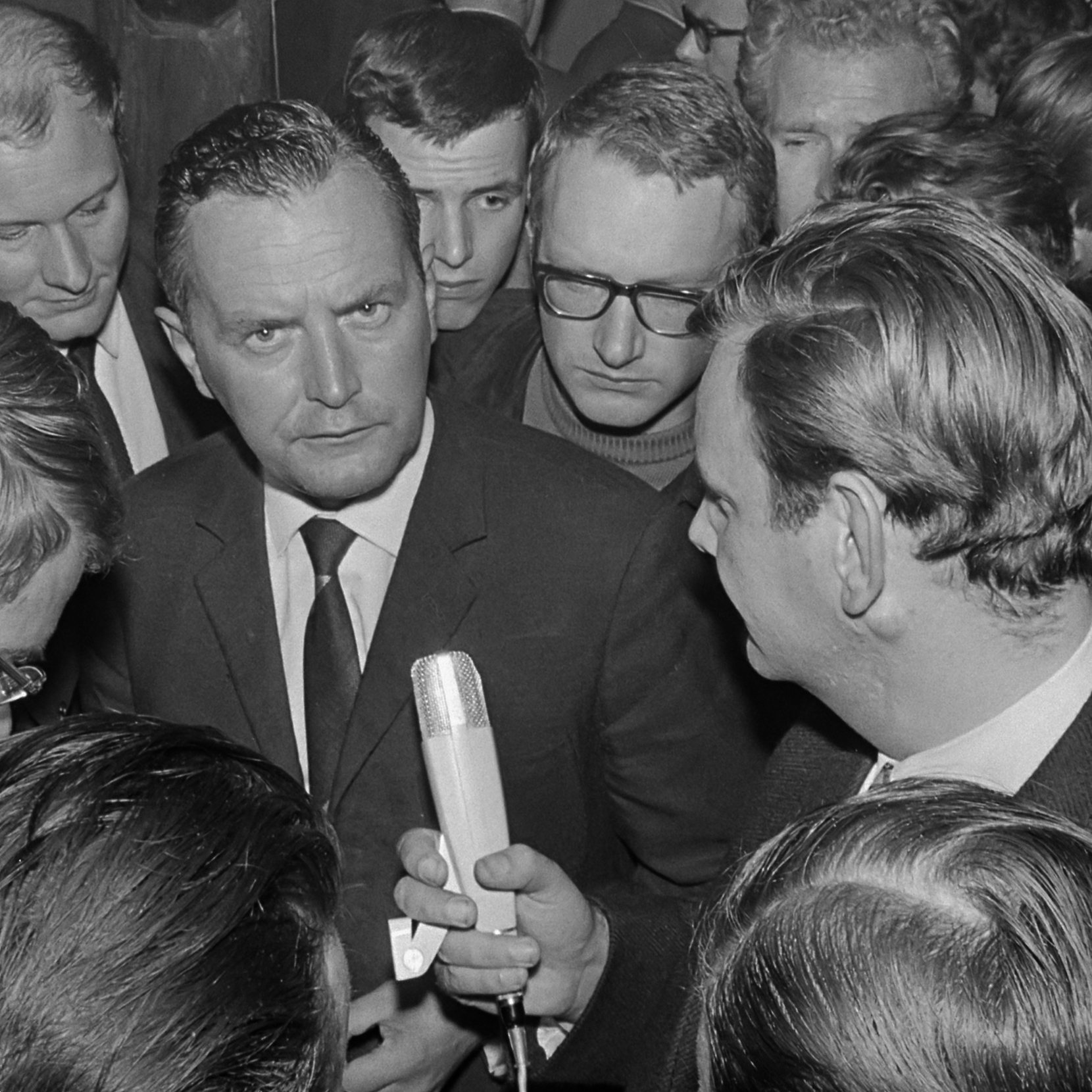 Ir. Willem Stam wordt geinterviewd door de politiek journalist van KRO's Brandpunt, Frits van der Poel (rechts) 27 september 1966